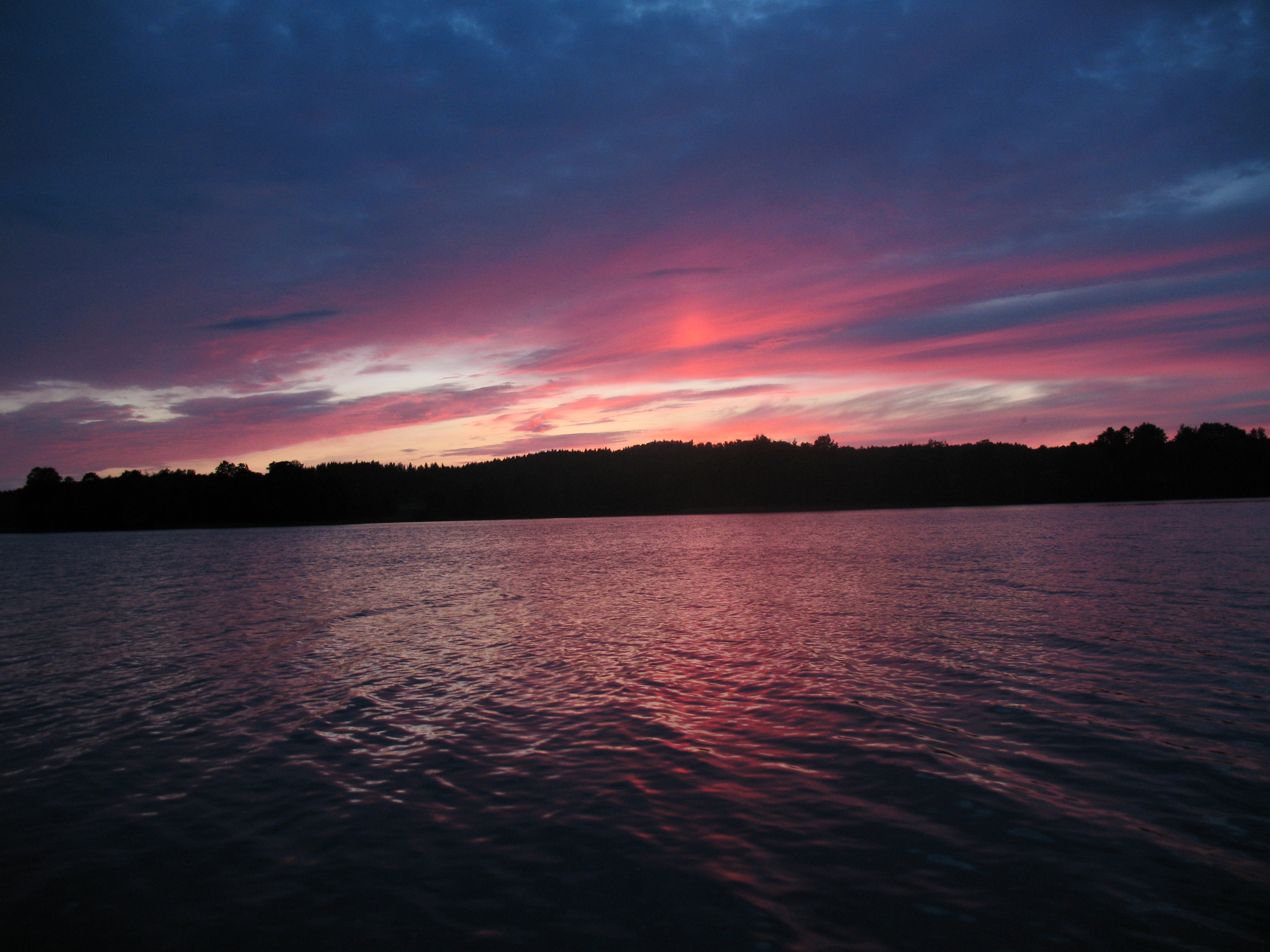 Zachod Slonca